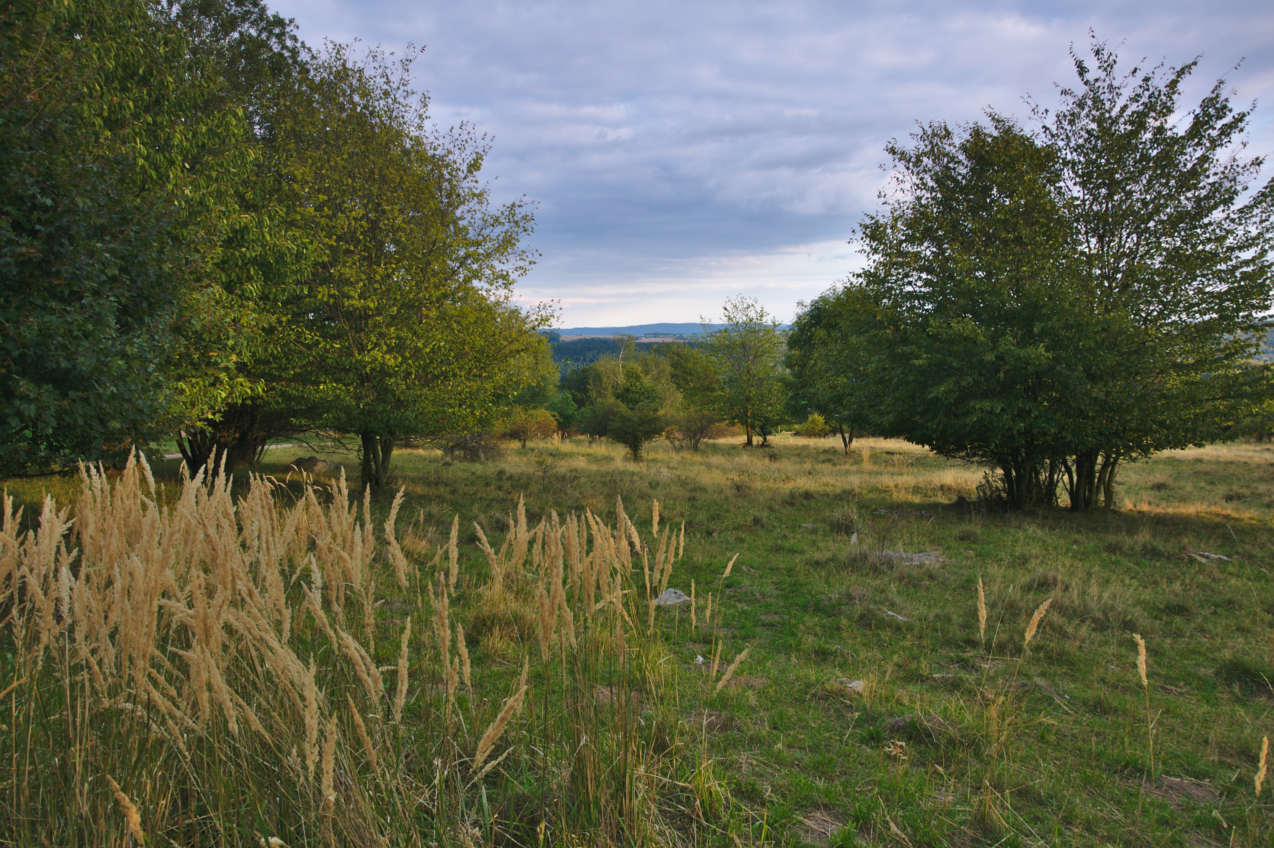 Přírodní památka Synalovské kopaniny, okres Brno-venkov